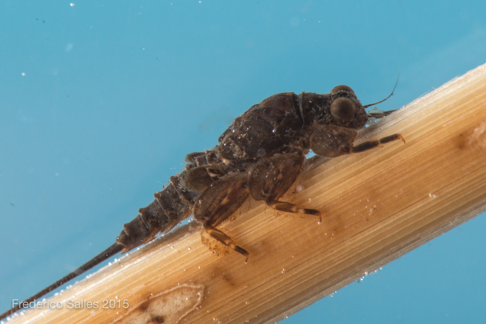 Ninfa da espécie Melanemerella brasiliana (Melanemerellidae), endêmica do Brasil